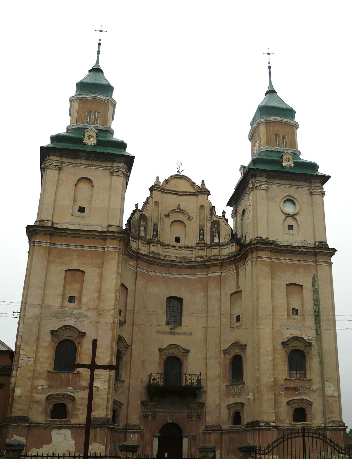 Zbaraż, kościół oo. bernardynów